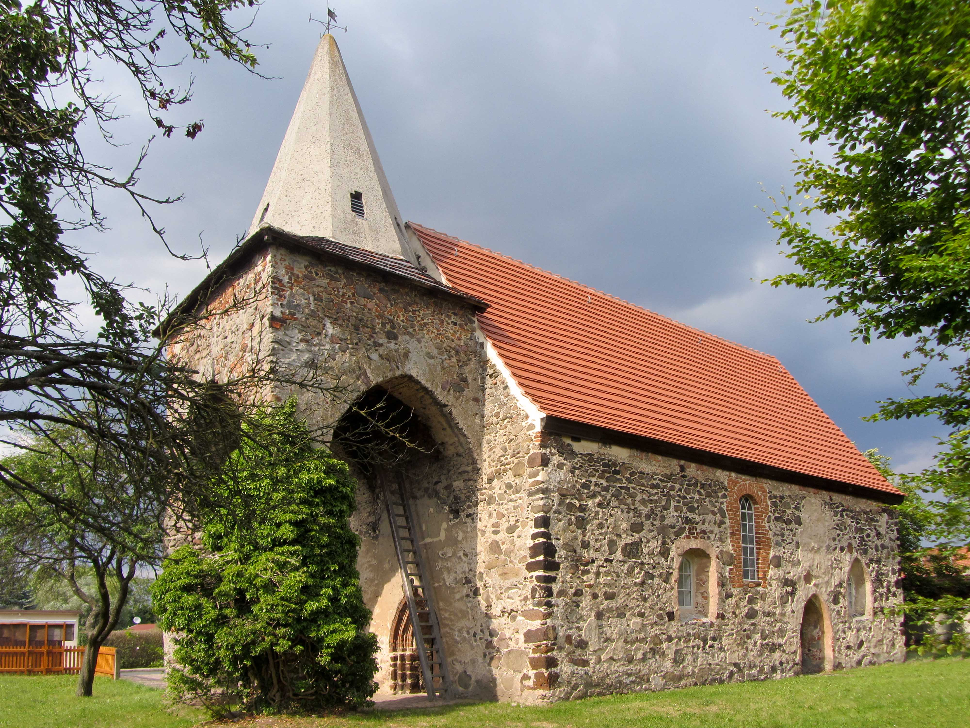 Kirche Walddrehna: Es handelt sich dabei um eine kleine Kirche aus dem 13. Jahrhundert, der eine ungewöhnliche, nach drei Seiten hin offene Vorhalle als Glockenträger mit massivem Kegelhelm aus Backstein angefügt wurde. Deren hohe Spitzbogenarkaden ruhen auf zwei aus Feldsteinen gemauerten Rundpfeilern, die von einigen Historikern als Überreste einer vorchristlichen Weihestätte angesehen werden.